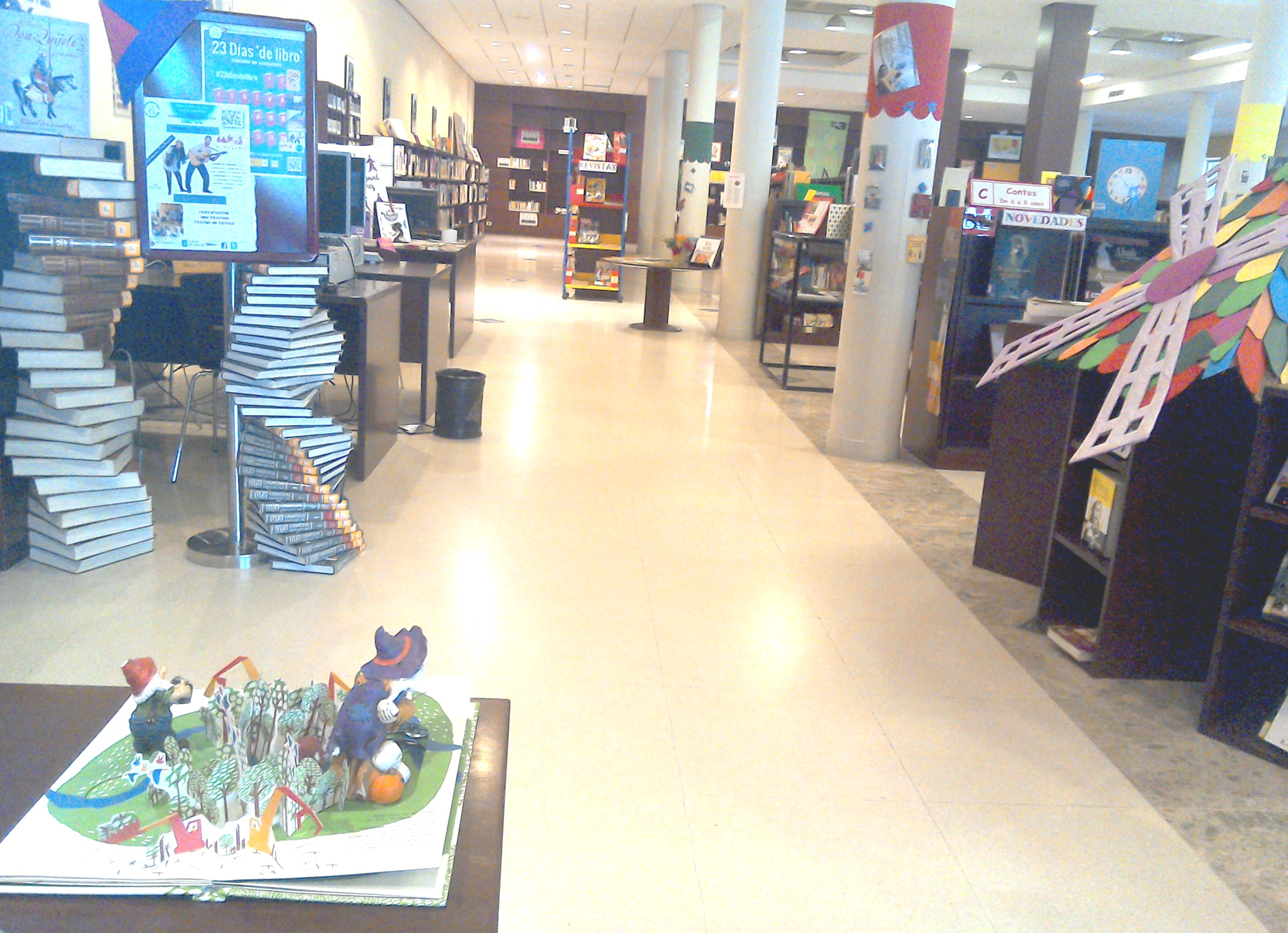 Sala infantil da Biblioteca Pública da Coruña Miguel González Garcés